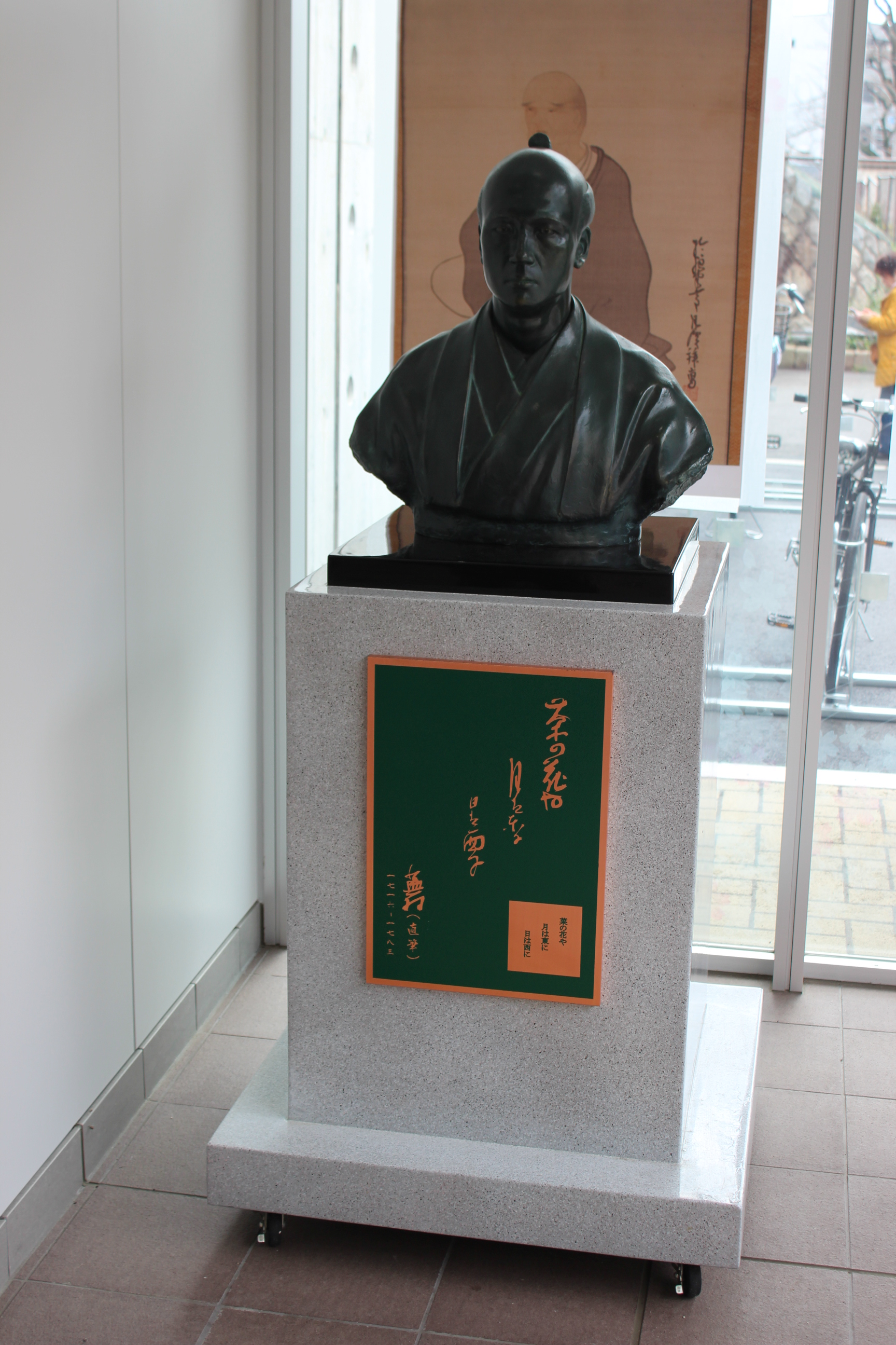 城北公園通駅構内にある蕪村像